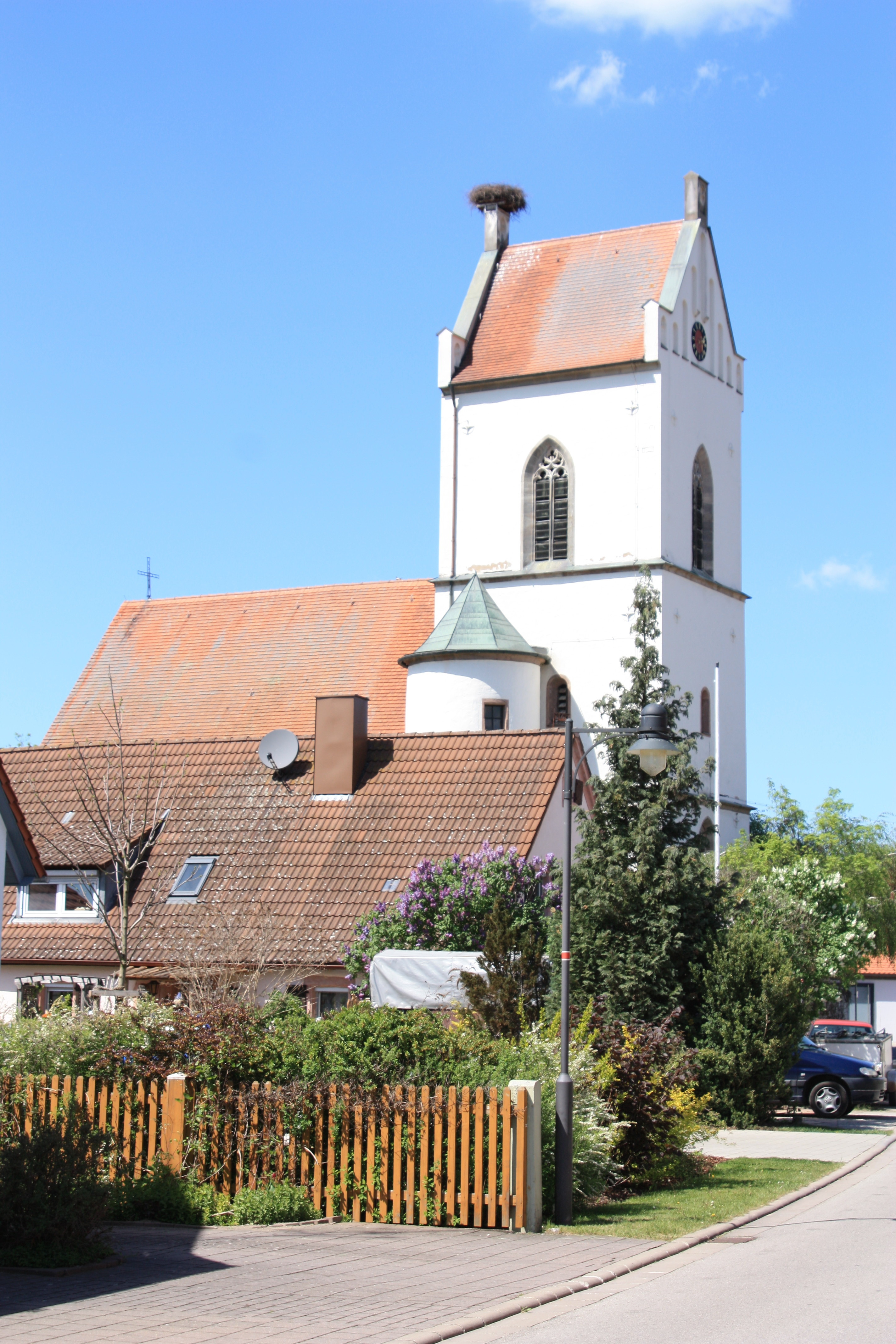 Muhr Evang.-Luth. Filialkirche St. Jakob maior und St. Georg, 1617-1622